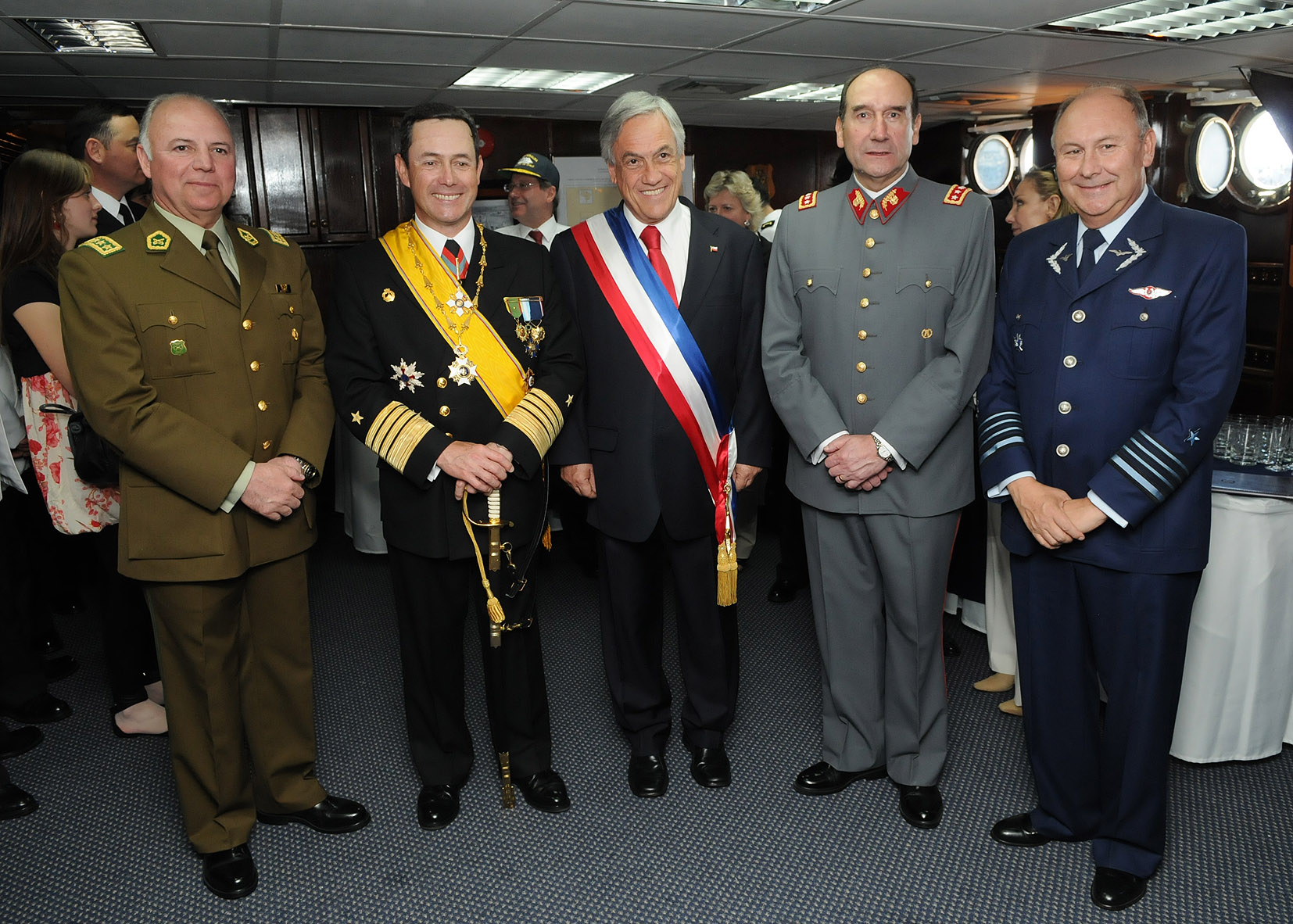 El Mandatario presenció acompañado de ministros y autoridades la Revista Naval Bicentenario a bordo del Buque Escuela Esmeralda. En la oportunidad destacó la presentación, felicitando a las Fuerzas Armadas y Aérea “por la magnífica y formidable demostración de profesionalismo, de amor por la patria y de compromiso con su misión que hoy día hemos podido presenciar.